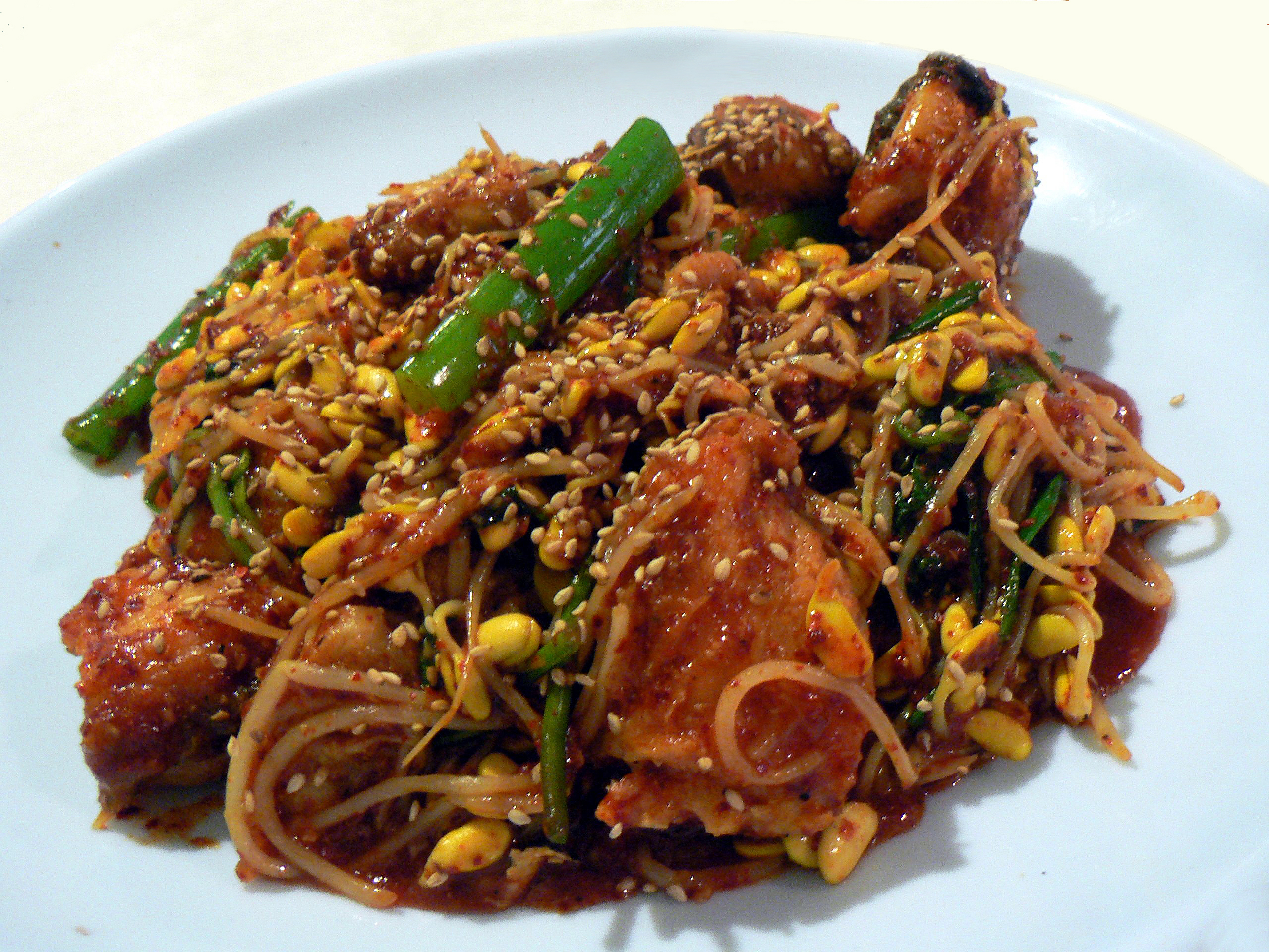 아귀찜, Agui jjim